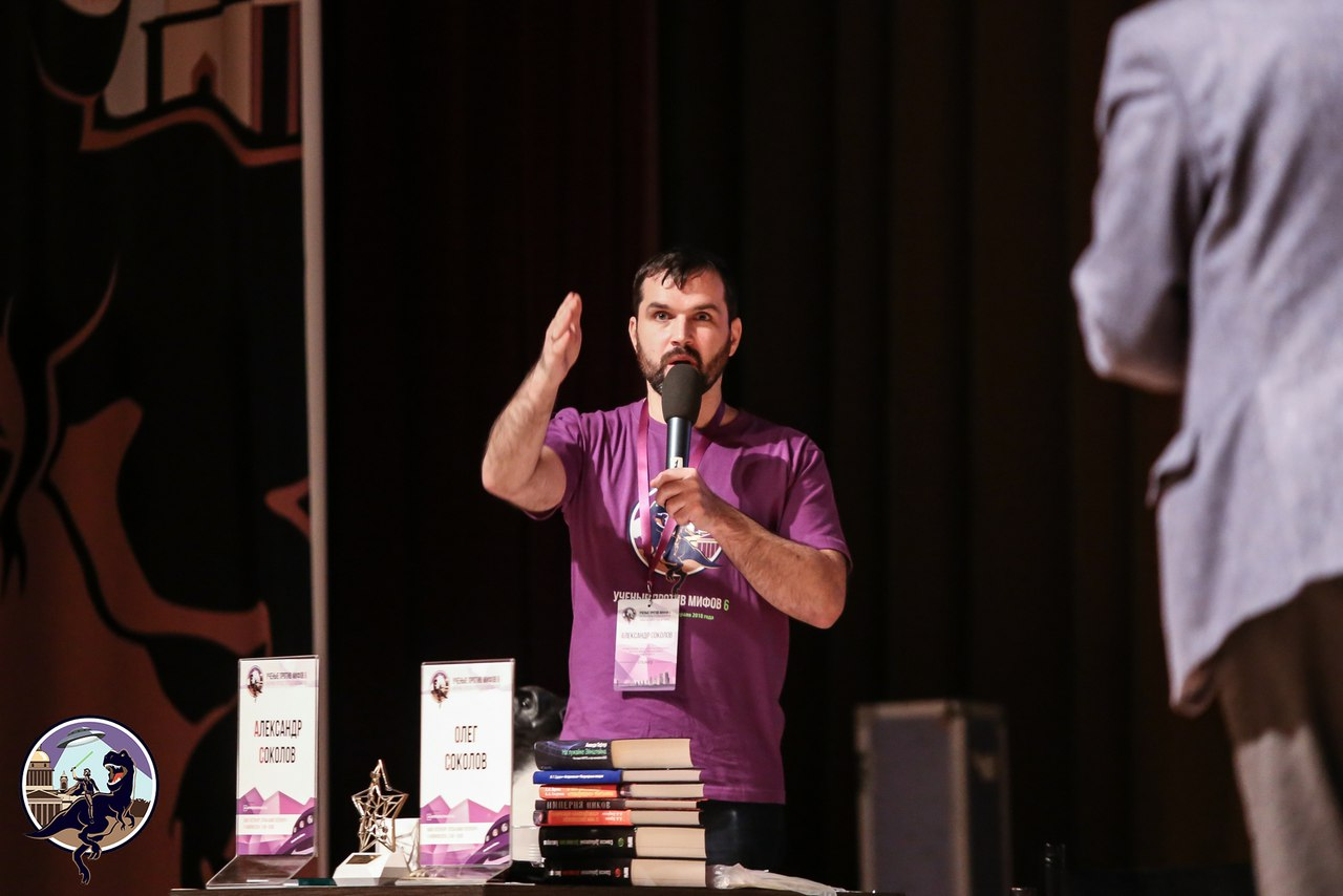 Александр Соколов лицом, спиной Oleg Sokolov / Оле́г Вале́рьевич Соколо́в - Ученые против мифов, Санкт-Петербург